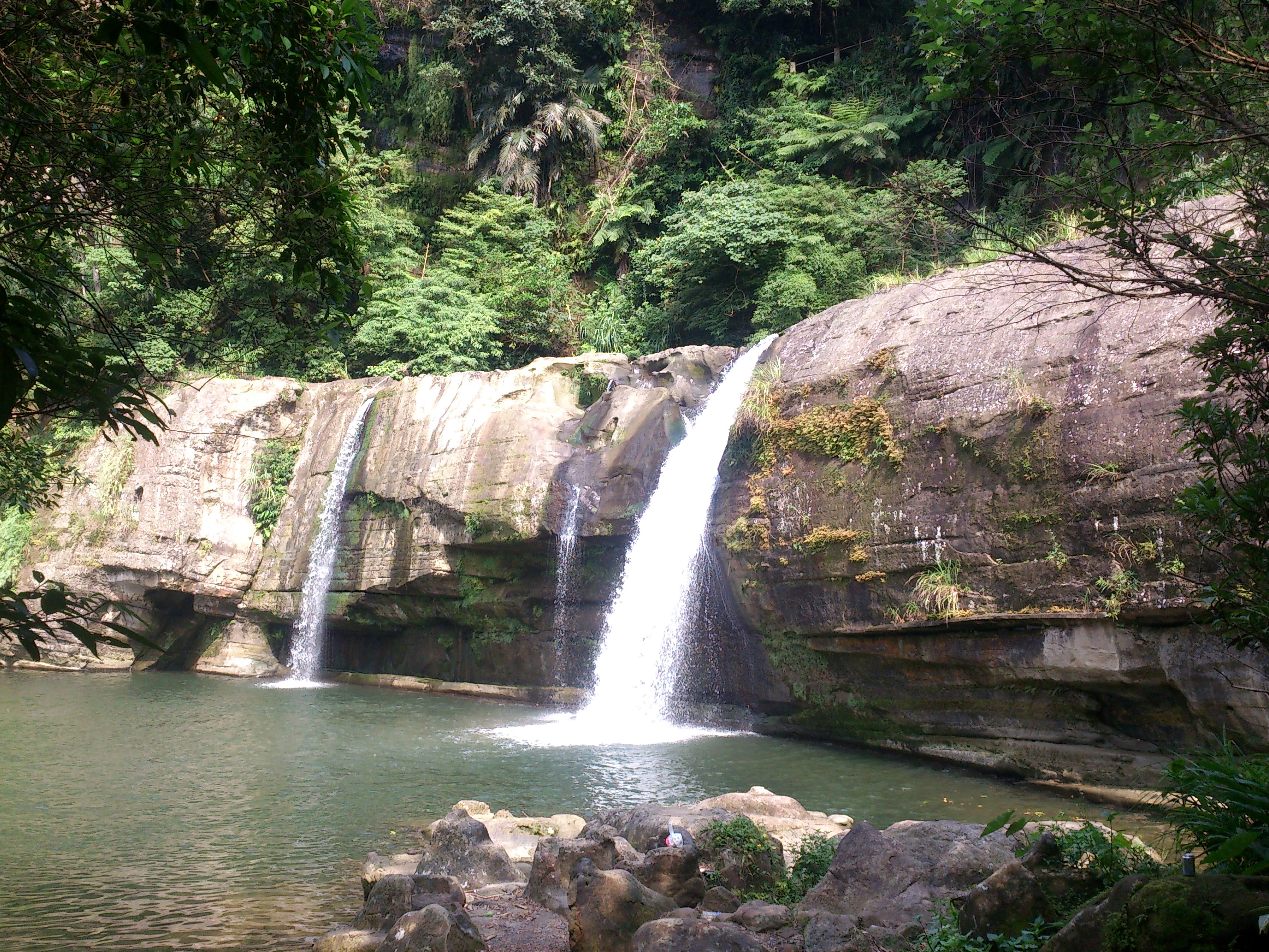 位於嶺腳車站旁的嶺腳瀑布